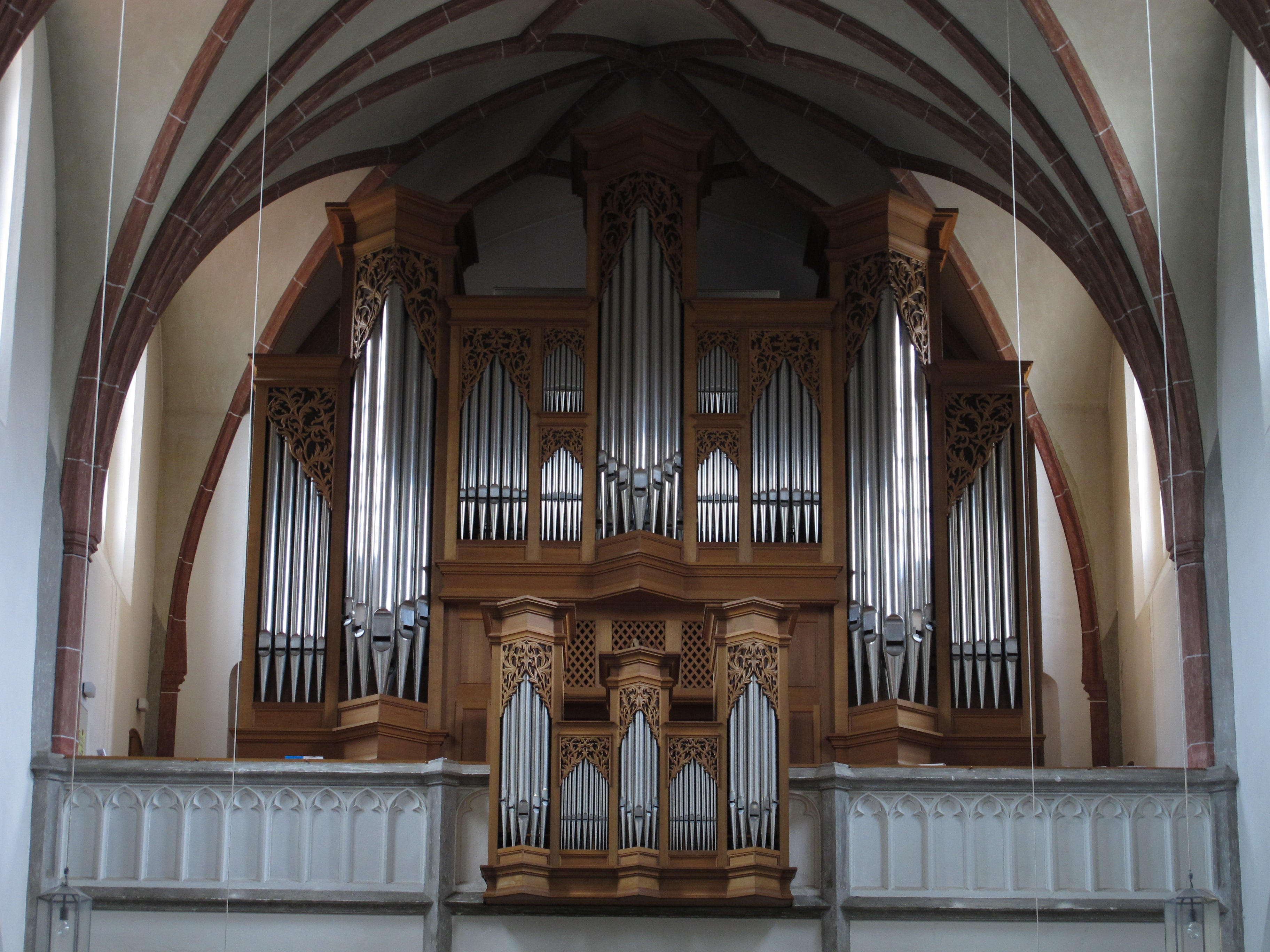 Pfarrkirche Sankt Jakob (Burghausen): Orgel